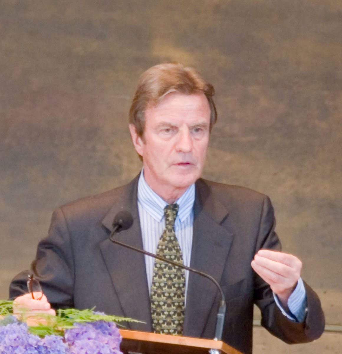 Bernard Kouchner, Université de Fribourg, Suisse, 17 mai 2006.